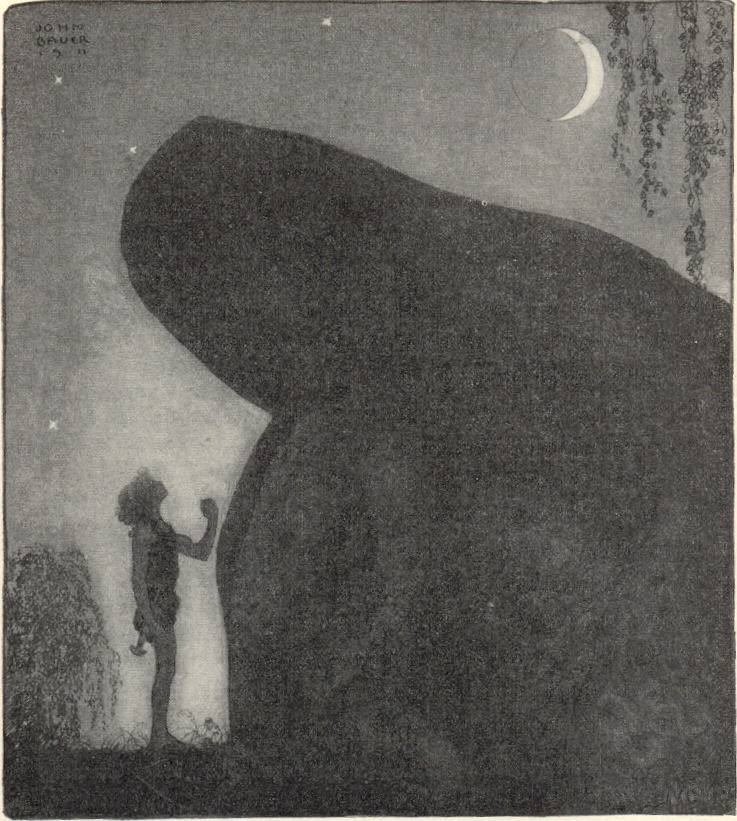 For Our Fathers' Godsaga by Viktor Rydberg